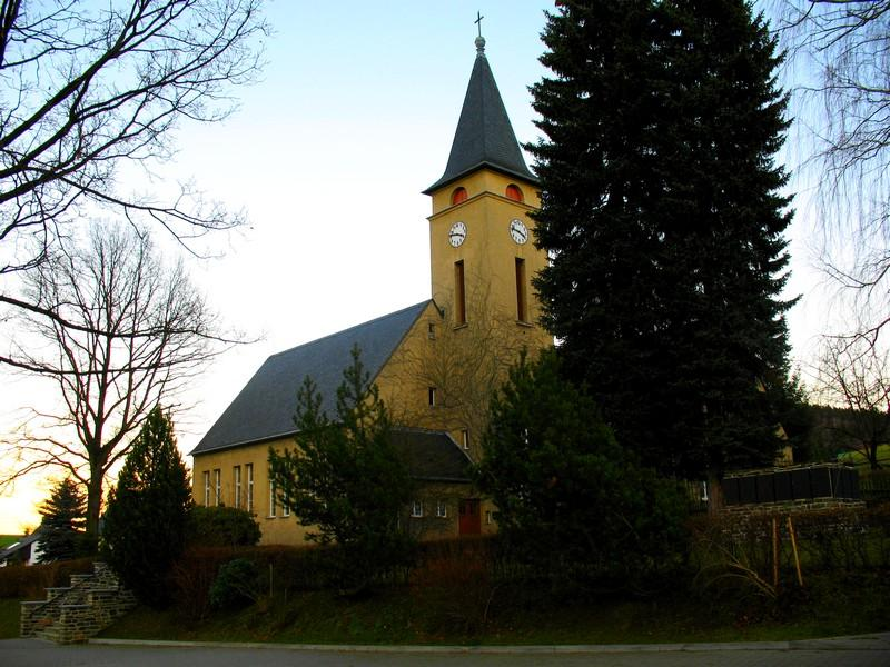 Kirche von Pöhla / Church of Pöhla